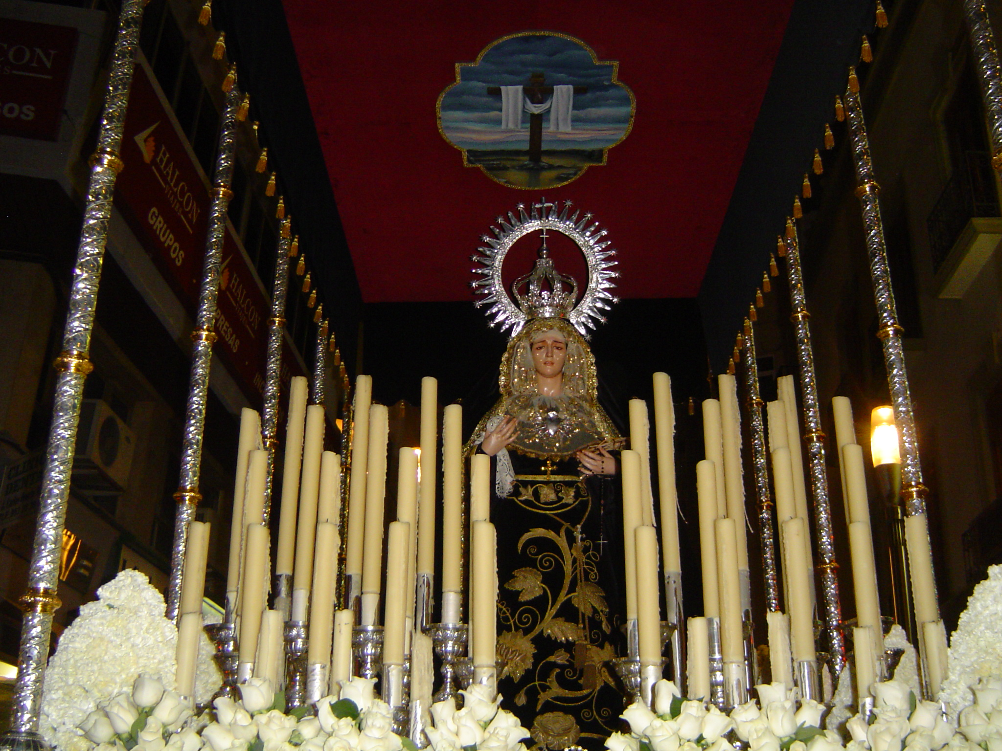 Paso de palio de Nuestra Señora de la Soledad